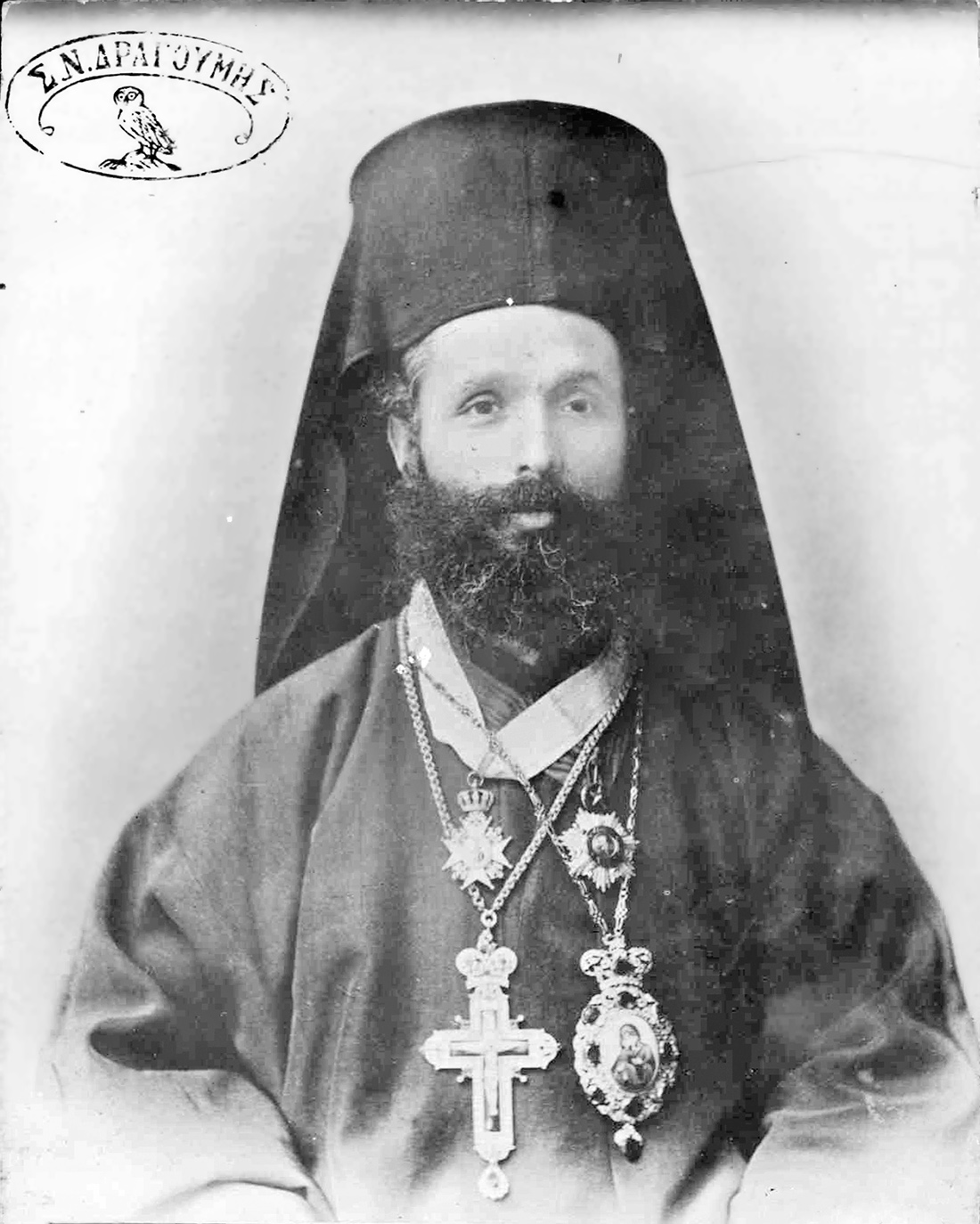 "Η Α.Σ. Ο Κορυτσάς Φώτιος δολοφονηθείς τη 9η Σεπτεμβρίου 1906 πλησίον του χωρίου Μπρατβίτσα".